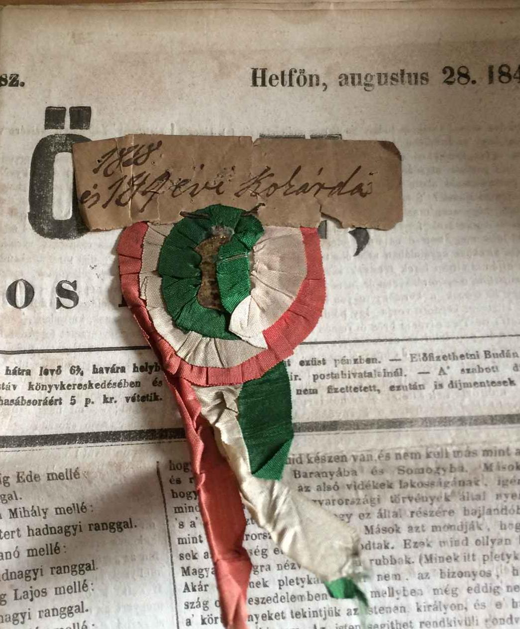 1848-ból származó pántlikás kokárda. A magyar kokárdát március 15-én, az 1848–49-es forradalom és szabadságharc kezdetét jelentő pesti forradalom évfordulóján szokás viselni. A magyar hagyomány szerint a pesti radikális ifjúság vezérei Petőfi Sándor és Jókai Mór szerelmeiktől, Szendrey Júliától illetve Laborfalvi Rózától kaptak nemzetiszínű kokárdát a forradalom estéjén.